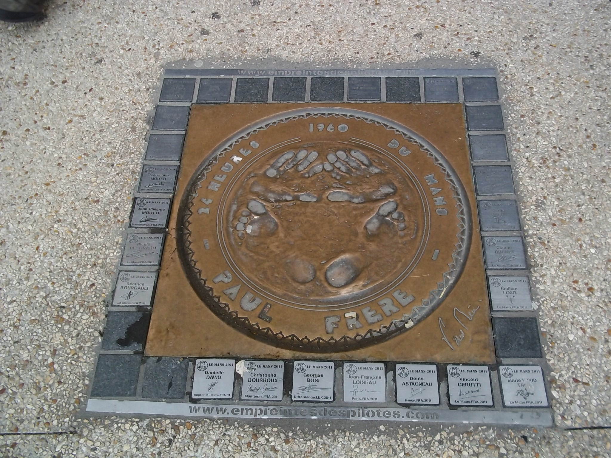 Plaque de bronze des empreintes de Frere